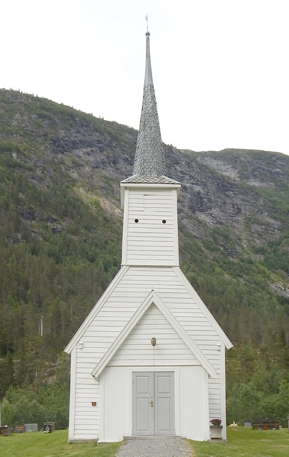 Jostedal kirke